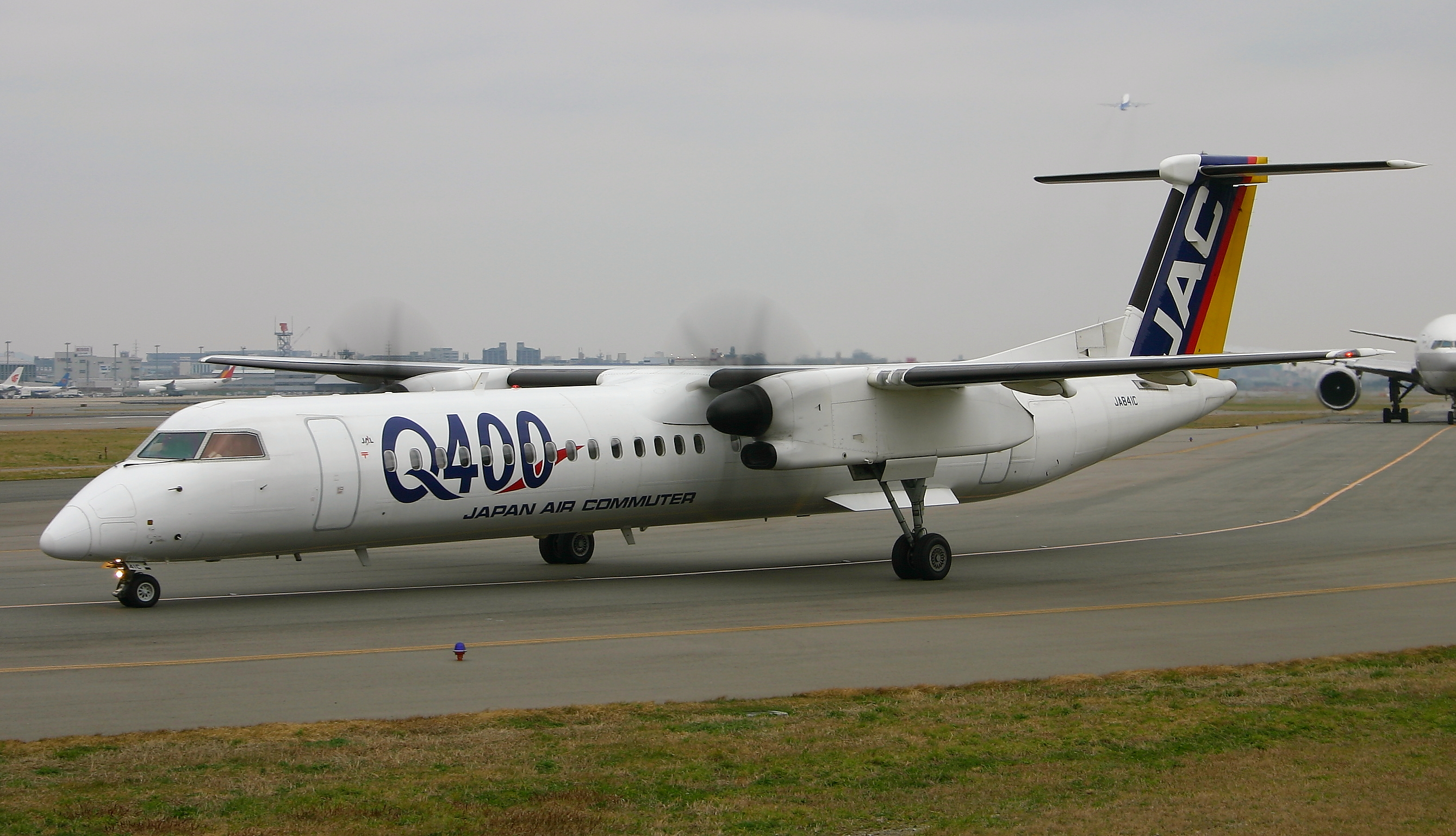 日本エアコミューター ボンバルディア DHC-8-Q400 福岡空港